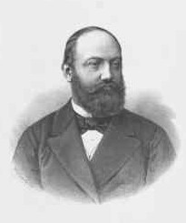 Adolf rytíř von Obentraut (1833-1909), rakouský politik